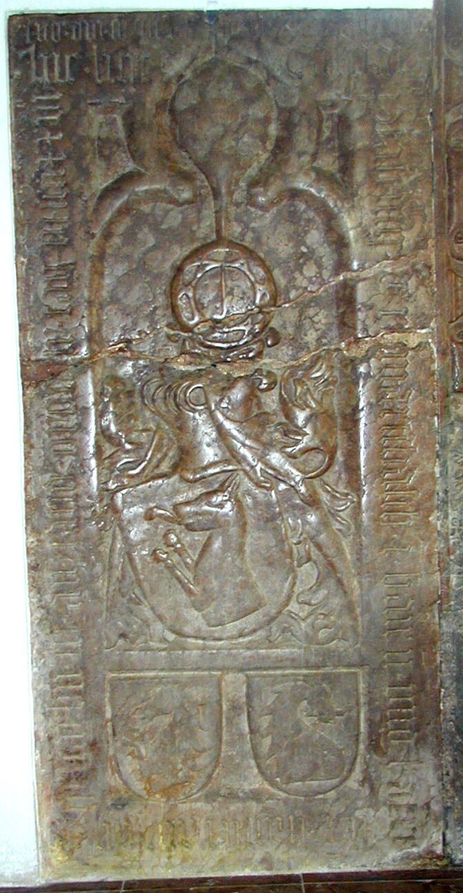 Grabstein des Caspar I. Pfäffinger aus rotem Marmor in der Kirche von Salmanskirchen bei Ampfing in Bayern (Deutschland).